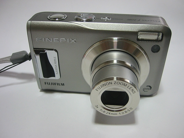 富士フイルムFinePix F31fd